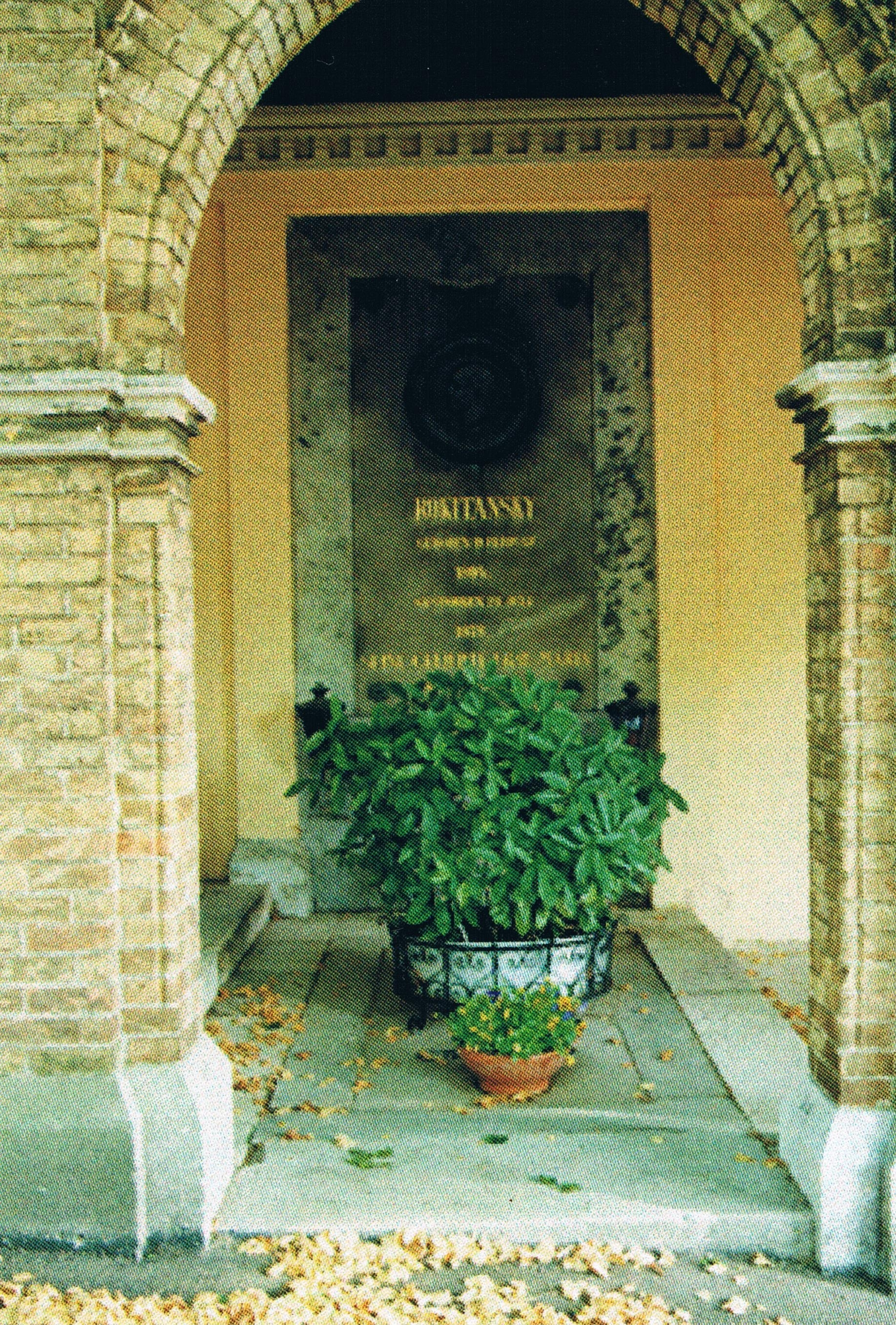 Friedhof Hernals-Hans Rokitansky